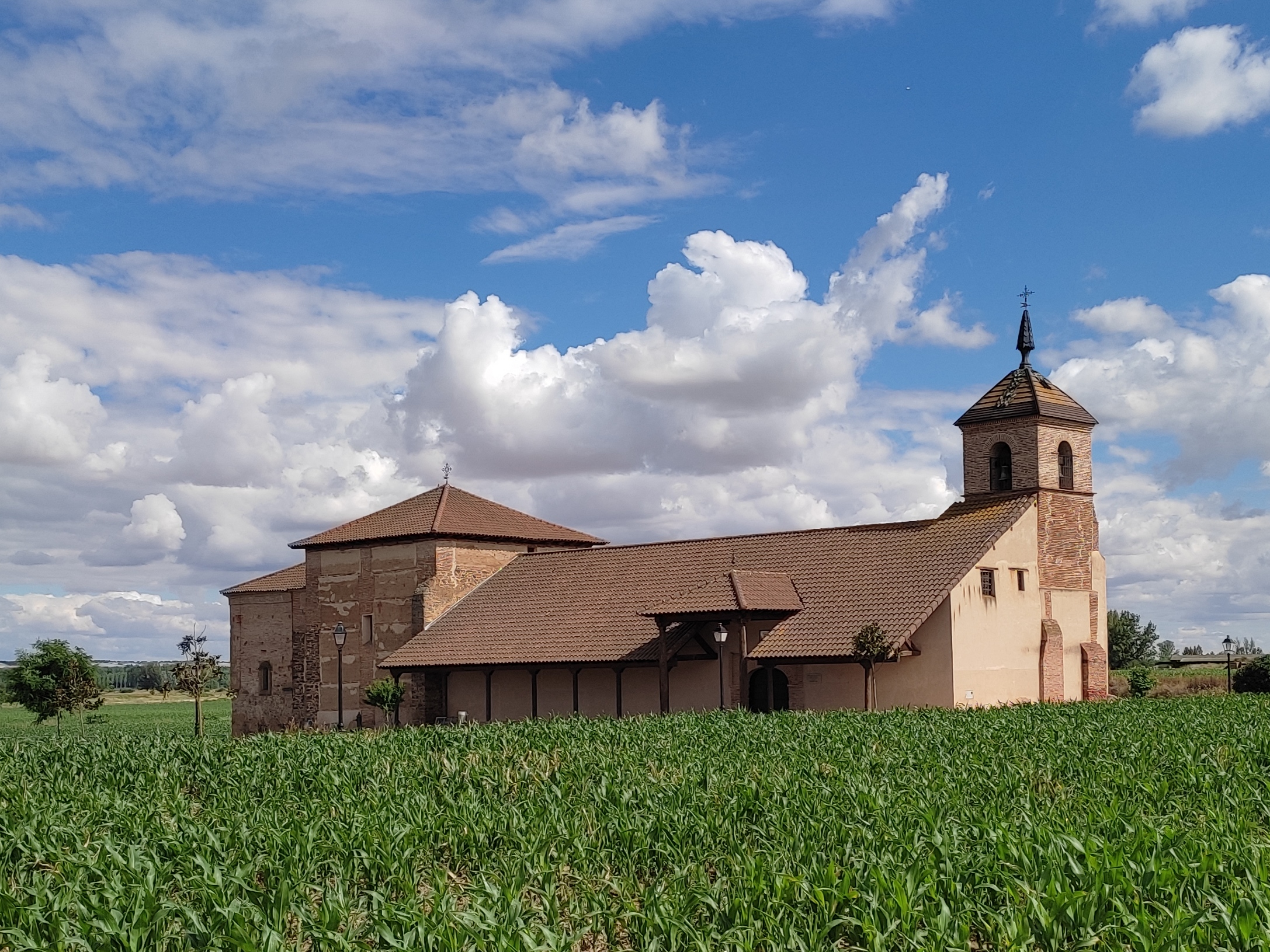 Ermita de la Piedad en Villademor de la Vega (León)